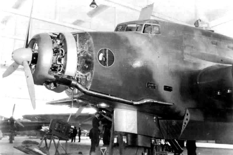 Aereo Savoia Marchetti SM.82